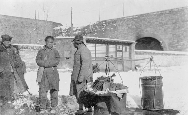 China, Peking, kandierte Zuckerstangen Händler